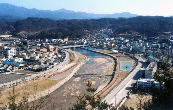 Bonghwa, Gyeongsangbuk-do